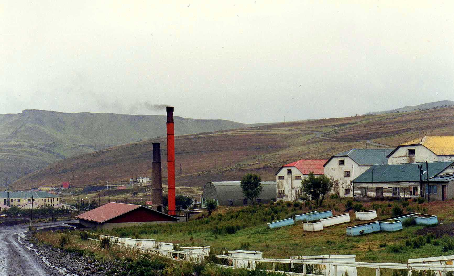 Villa minera de Río Turbio, Santa Cruz, Argentina